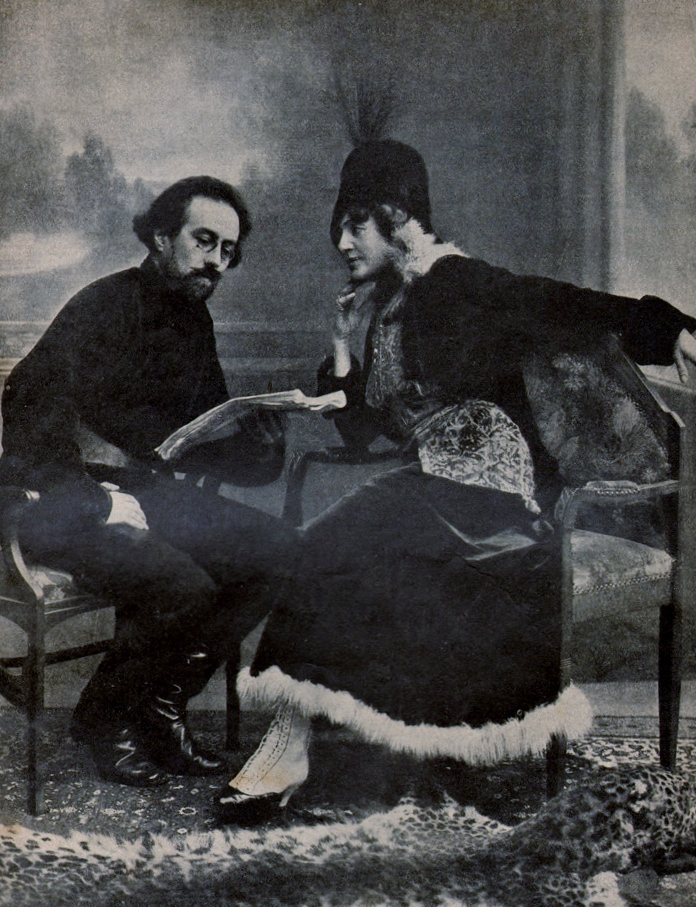 Драматург Михаил Арцыбашев читает свою пьесу «Закон дикаря» актрисе Л. Б. Яворской.